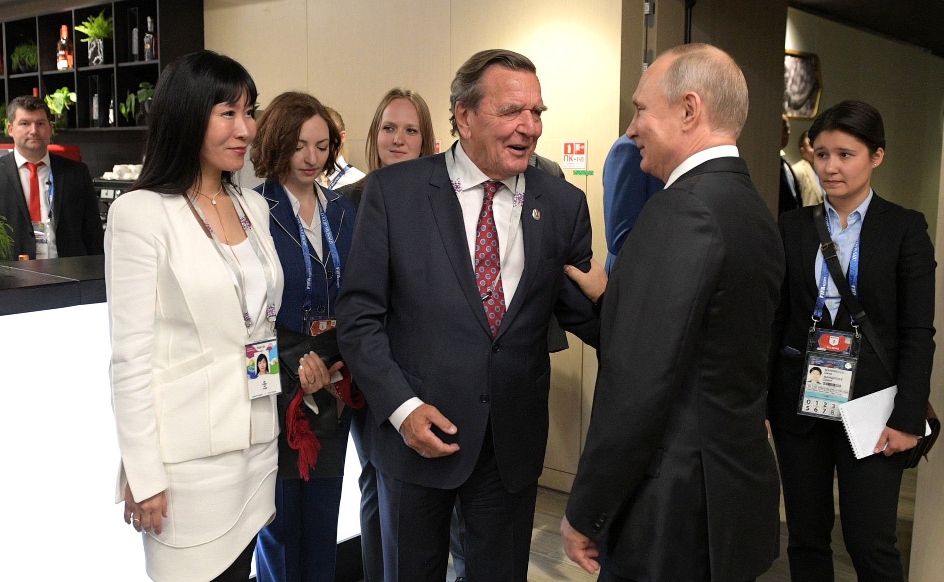 В перерыве матча Президент России Владимир Путин кратко пообщался с иностранными гостями, прибывшими на Чемпионат мира по футболу 2018 года